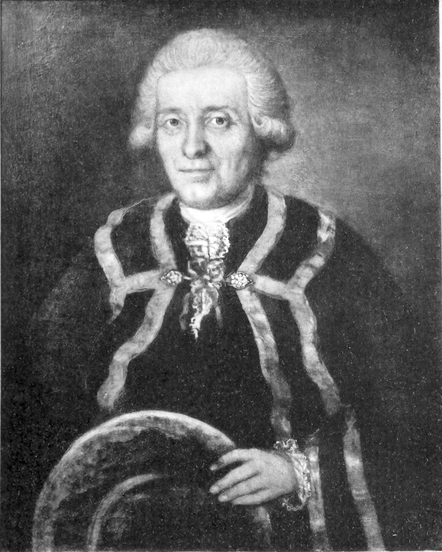 Kilian Stobæus den yngre (1717-1792). Äldre man, midjebild, fas t. h., med mörkblå ögon, grå ögonbryn, hvit uppstruken peruk i kanonlock vid örat, hvit lindad halsduk, spetskrås, spetsmanschetter. Mörk dräkt, öfver båda axlarna den mörka rektorskappan utan krage, kantad med två rader guldgaloner och hopfäst öfver bröstet med röd rosett, bunden i silfver-maljor; där dessa äro fästade går en tvärgalon mellan kantgalonerna; kappan har mycket vida ärmar, kantade med två rader guldgaloner. Han håller med venstra handen framför sig sin runda mörka med guldgalon kantade hatt. Gråblå bakgrund. — På baksidan står: Kilian Stobæus J. F. Med. Doctor et artis obstetr. Professor. Na-tus anno 1717. DepictusAcad. Lundensis Rector Anno 1786 a Mar t. D. Roth. Olja på duk, 7772X63 ctm., af Martin David Roth 1786. Lunds universitet.